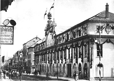 Meßhaus in Kassel, Sitz der Kasseler Messe und der Kasseler Handelskammer. Das Gebäüde wurde seit 1763 zu diesem Zweck erbaut. 1904 wurde an der Stelle des Meßhauses das heutige Rathaus Kassels errichtet. Das Bild zeigt das Gebäude anläßlich eines Kaiserbesuchs im Jahr 1891 geschmückt.